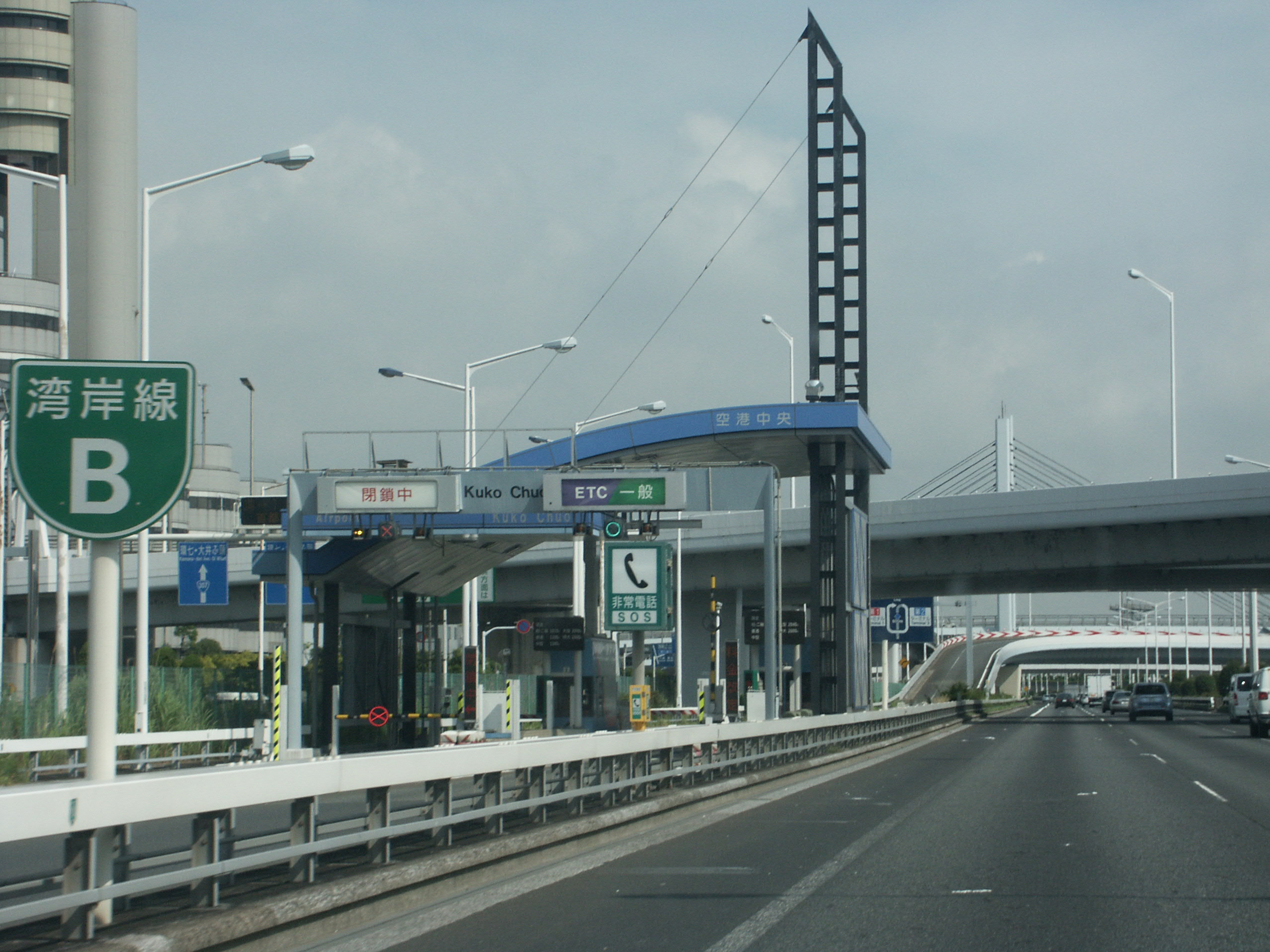 首都高速道路湾岸線東行き空港中央出口料金所